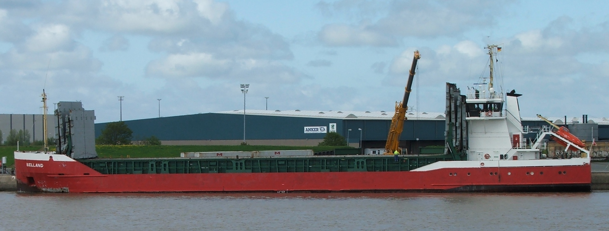 Das Küstenmotorschiff Belland (Bauwerft J.J. Sietas) bei Umschlagsarbeiten an der Emspier in Emden IMO Number: 8609618 MMSI Number: 248217000 Callsign: 9HA2261 Length: 88 m Beam: 13 m